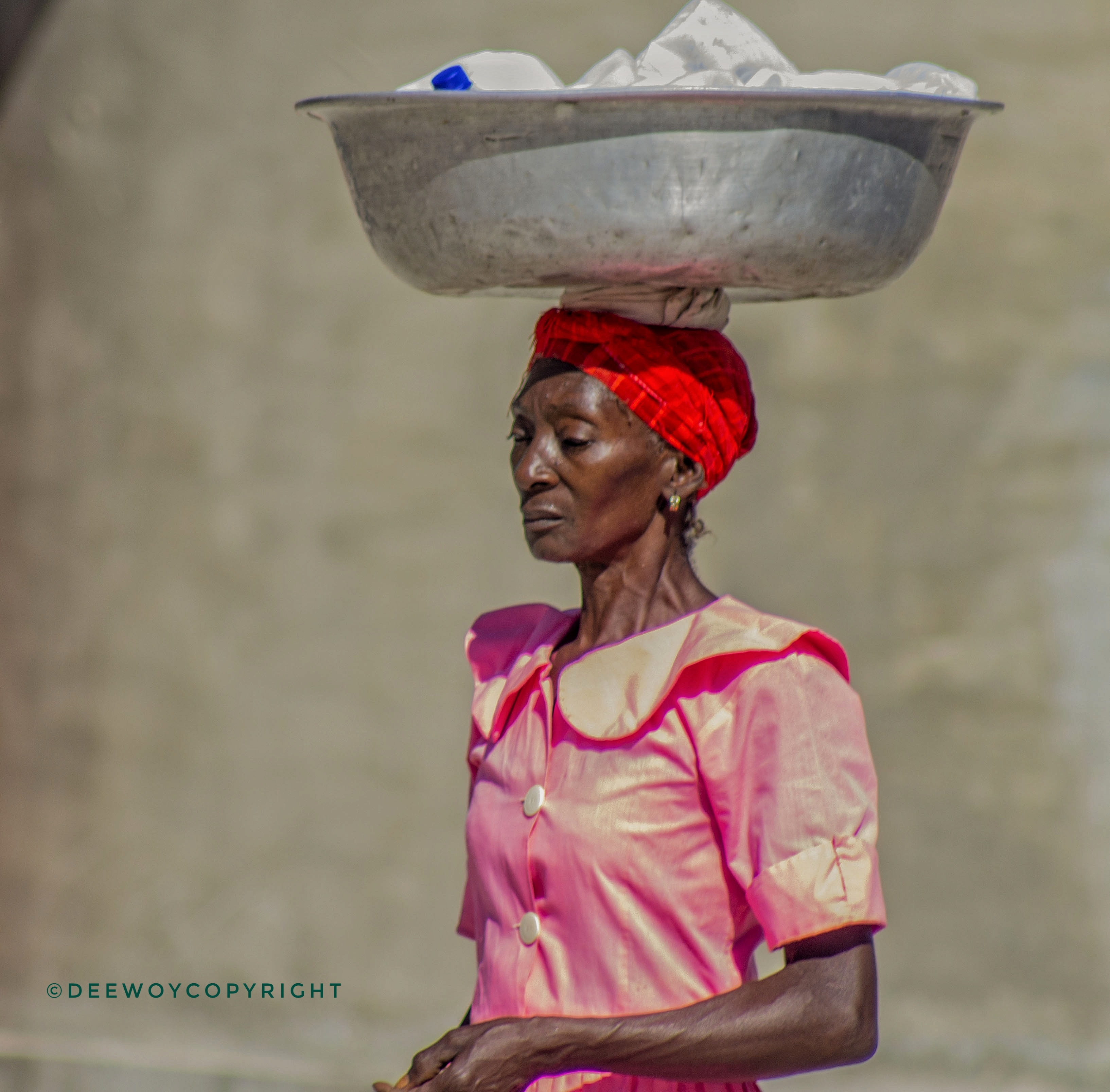 Femme marchande en Haiti